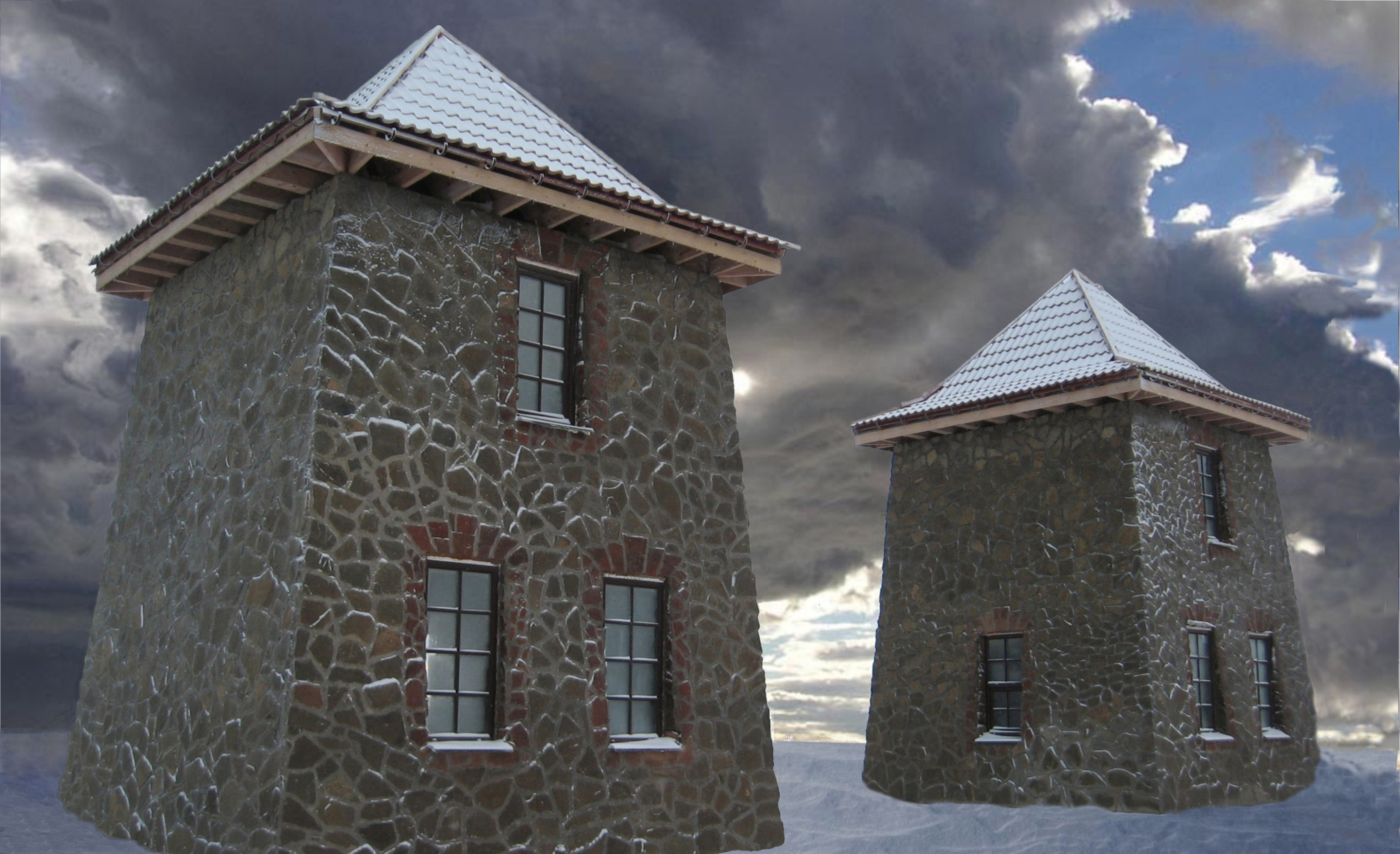 Гладковские ворота – архитектурная реплика, относящая наблюдателя к временам, когда Ревель (ныне Таллин) стал частью Российской империи, а Ревельский тракт (ныне Таллинское шоссе) по воле Петра I - главной дорогой из Петербурга в Европу.